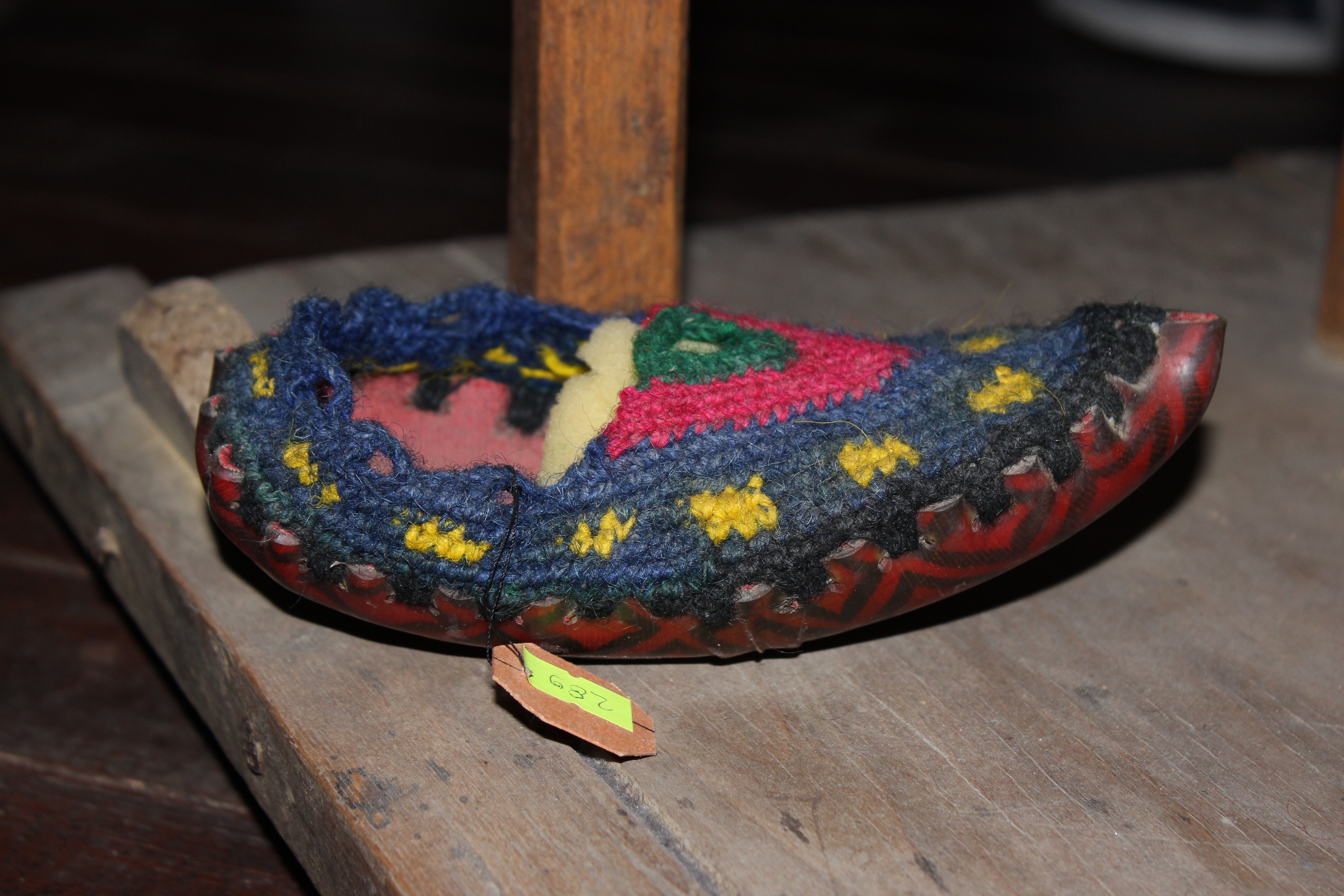 Kompleks banimi (Emin Gjiku) Muzeu Etnologjik